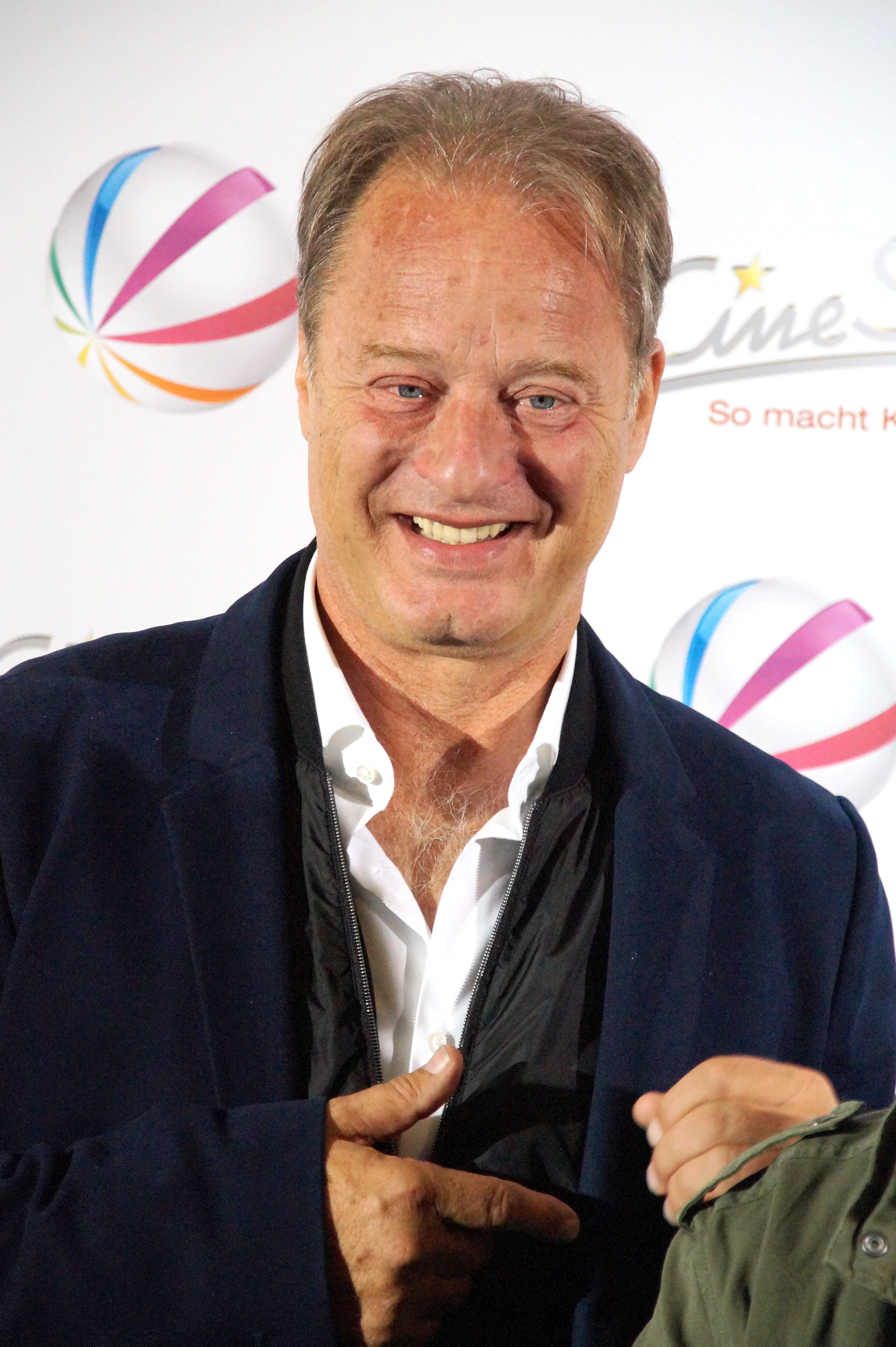 Tom Gerhardt bei der Premiere des Sat.1 Filmes "Volltreffer", am 29.9.16, in Dortmund.